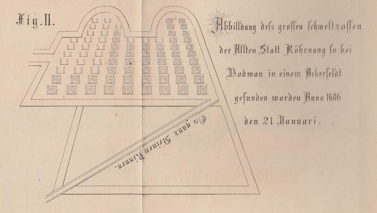 Deutschland (D) - Baden-Württemberg (BW) - Landkreis Konstanz (KN) - Bodman-Ludwigshafen: Villa rustica, "Abblidung des grossen Schmeltzoffen"